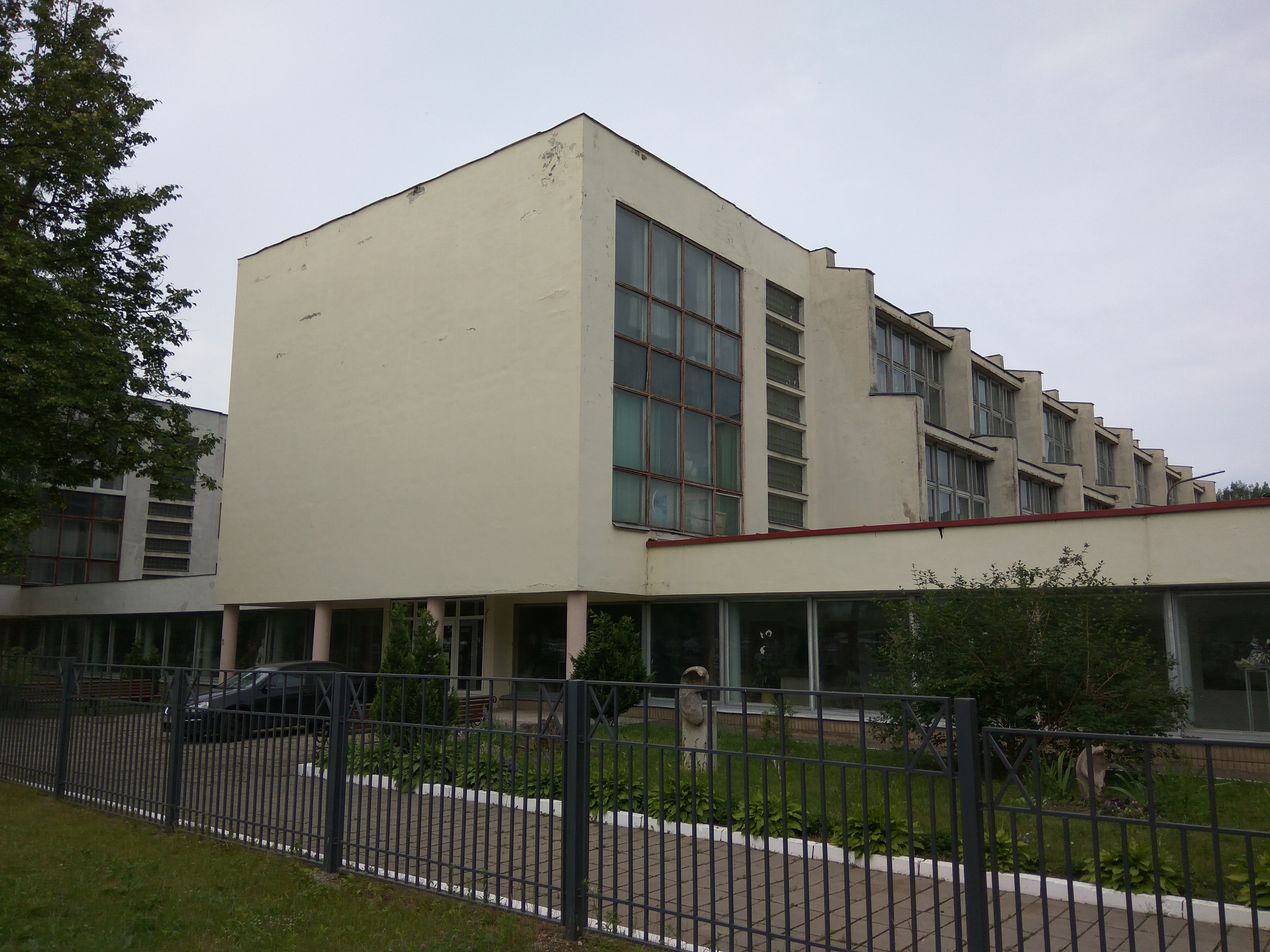 Мінск. Вуліца Макаёнка. Гімназія-каледж мастацтваў імя І. В. Ахрэмчыка